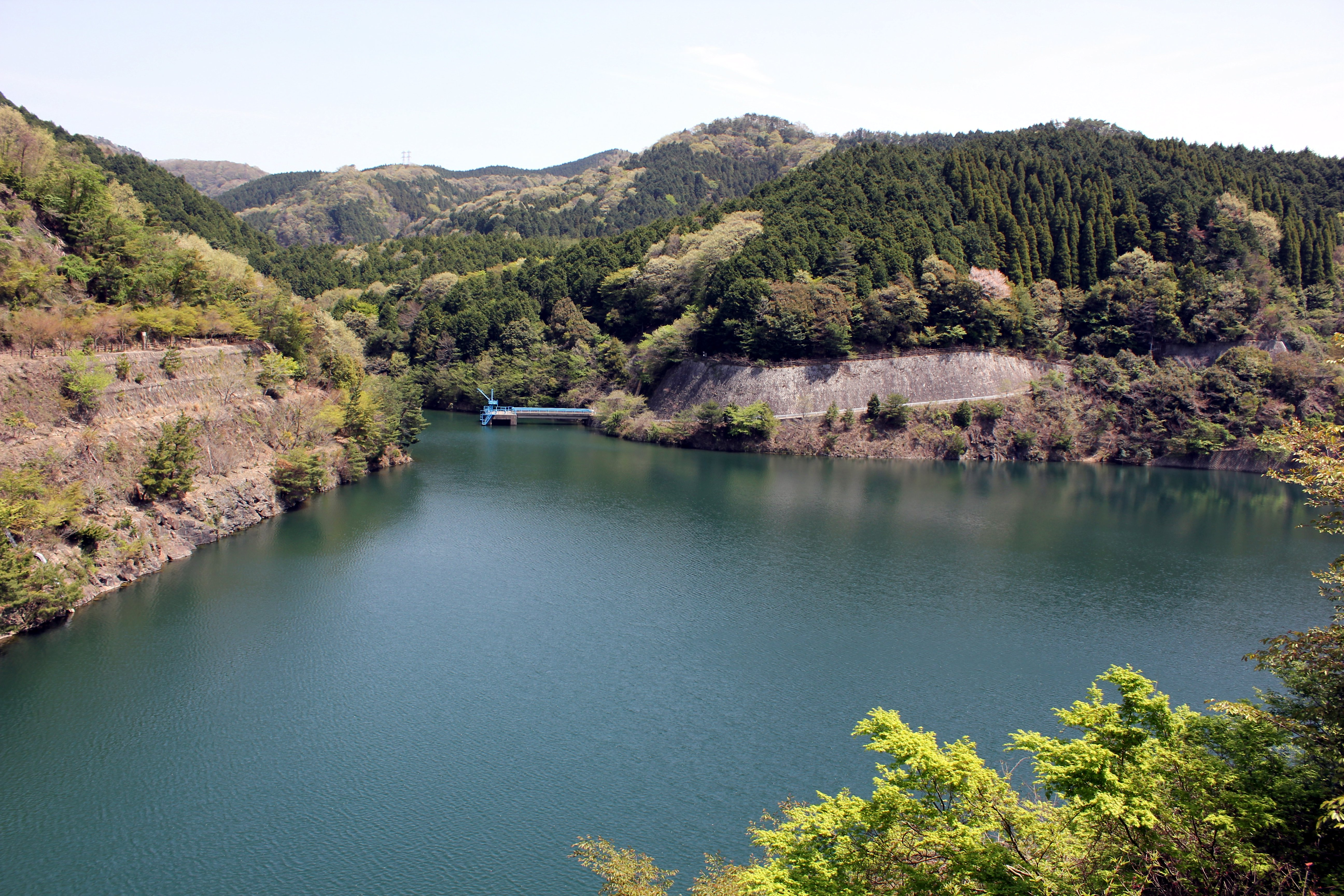 ゆうゆうレイク（大阪府箕面市。箕面川ダム湖）